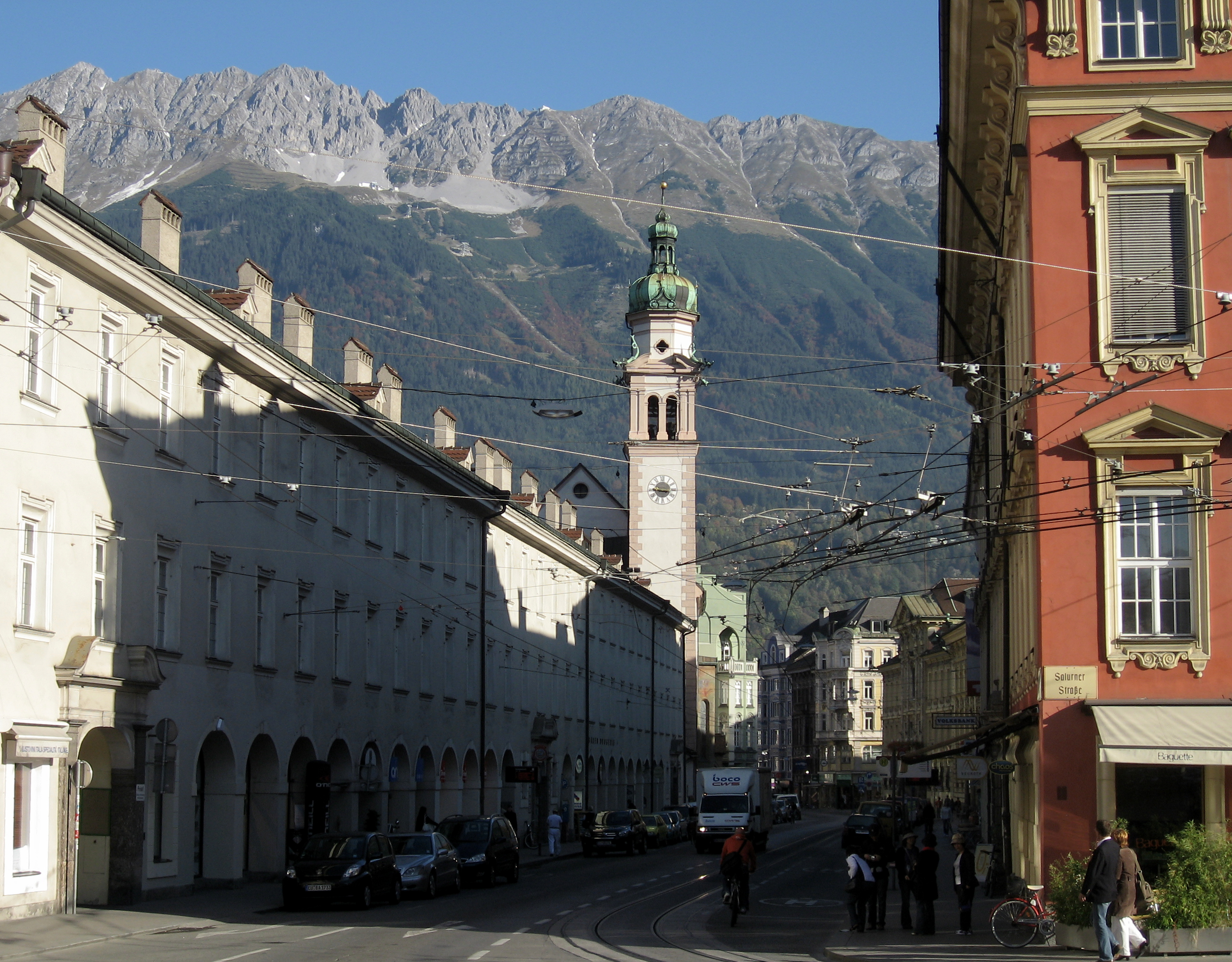 Österreich, Innsbruck, Innenstadt Richtung nordkette.